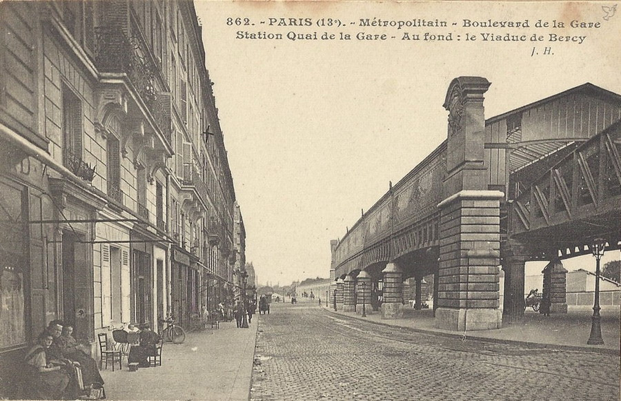 Quai de la Gare début 1900